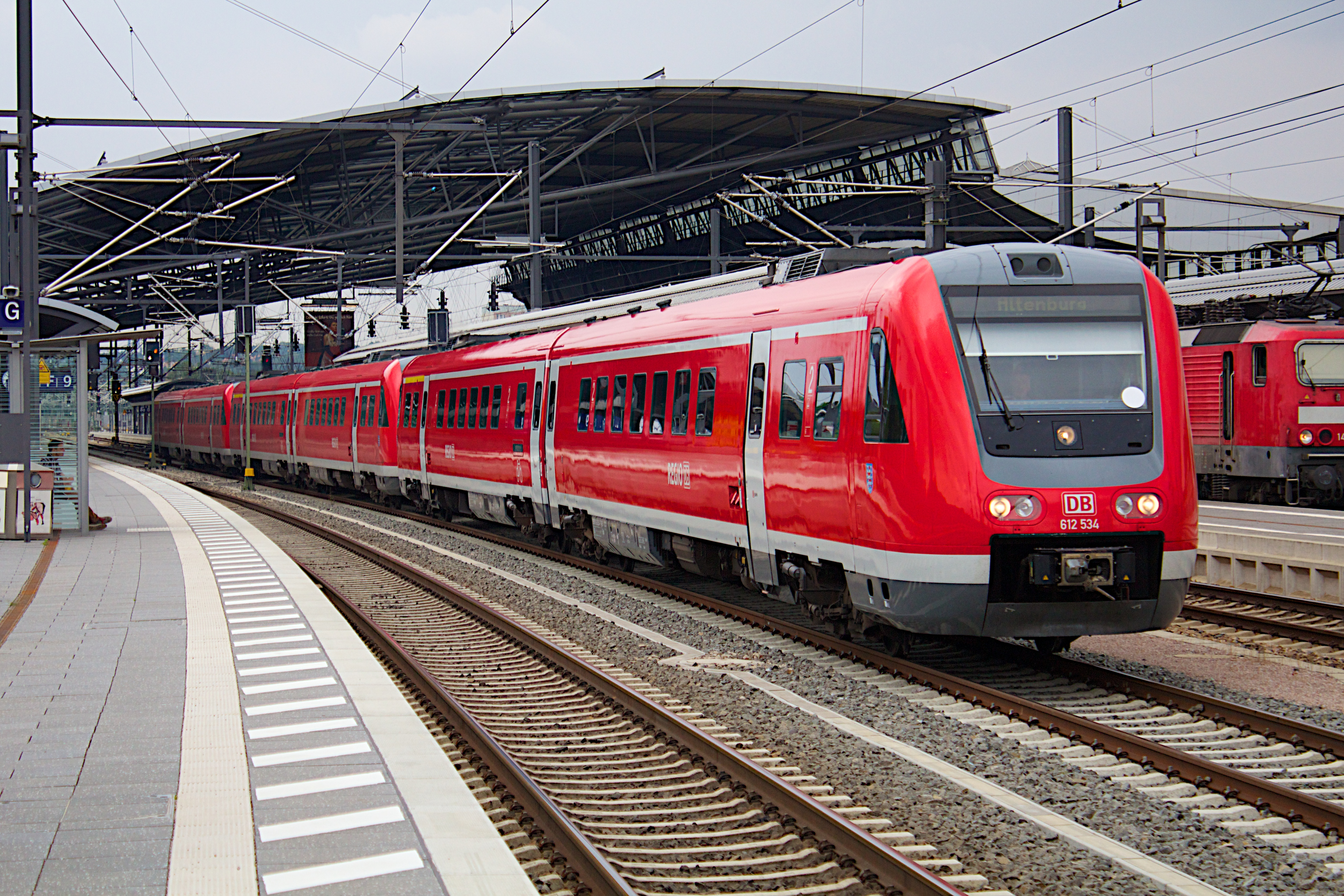 RE 3707 von Erfurt Hbf nach Altenburg.